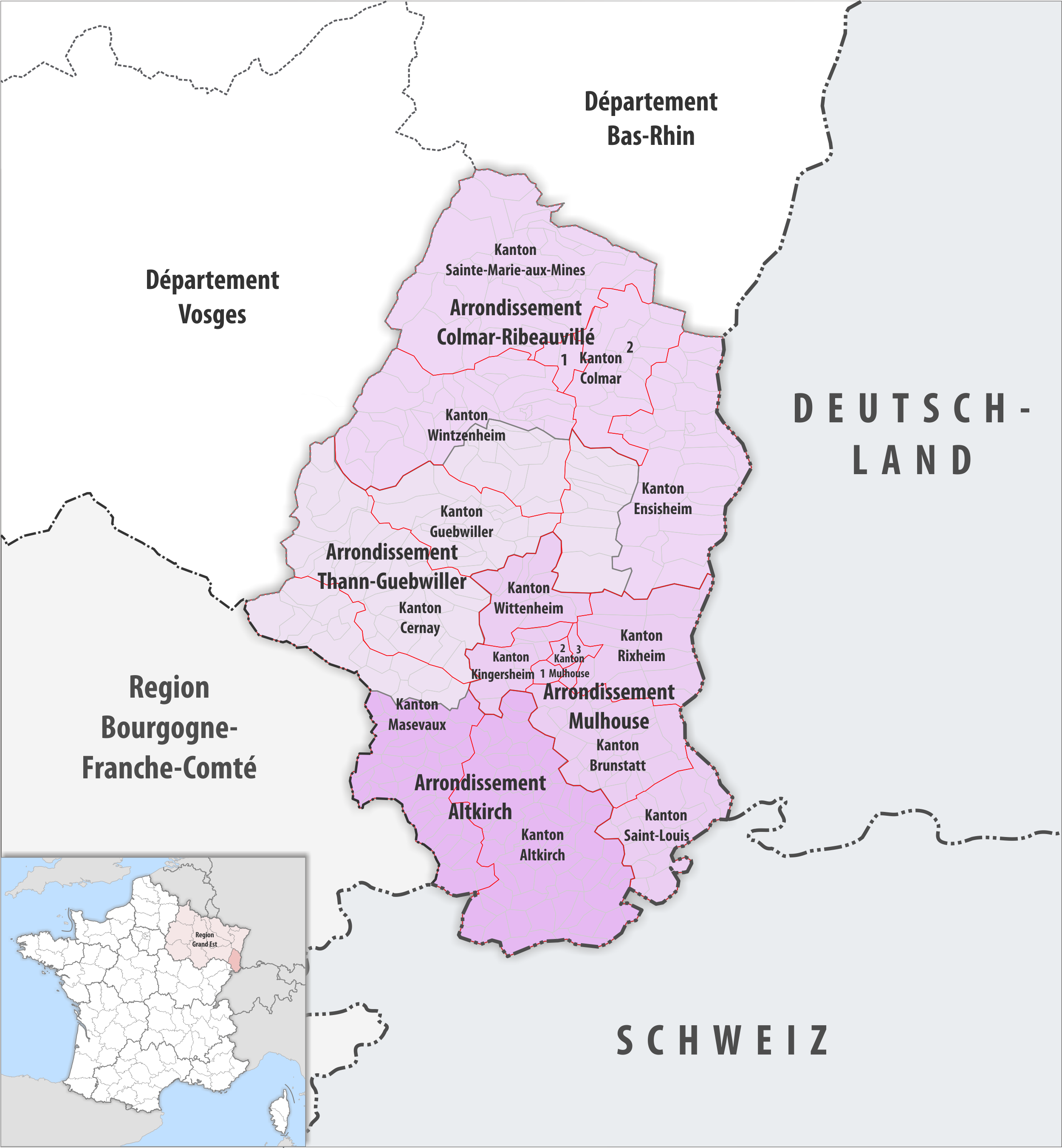 Gemeinden, Kantone und Arrondissemente im Departement Haut-Rhin